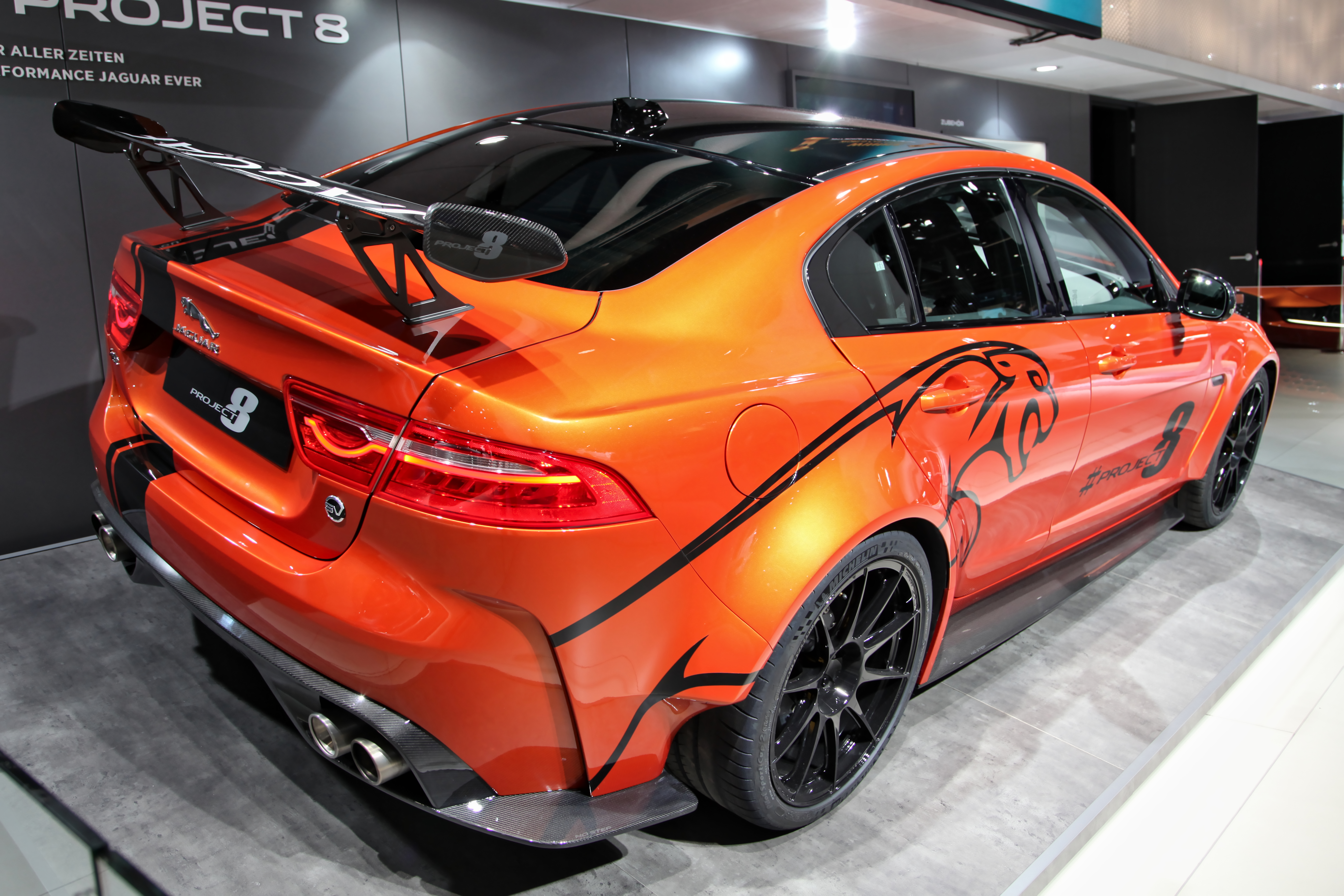 Jaguar XE SV Project 8